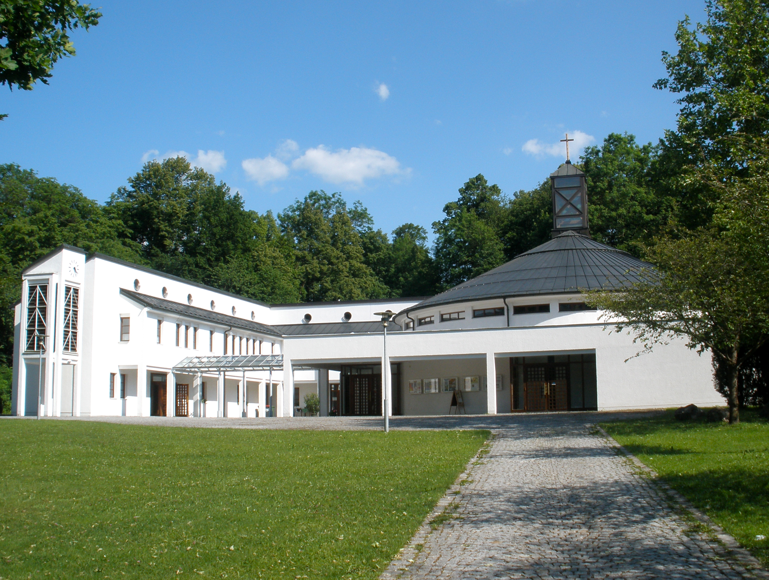 Die katholische Pfarrkirche "Jesus der Auferstandene" der Pfarre Gmunden-Ort wurde gemeinsam mit dem Pfarrzentrum in den Jahren 1987/1988 errichtet.